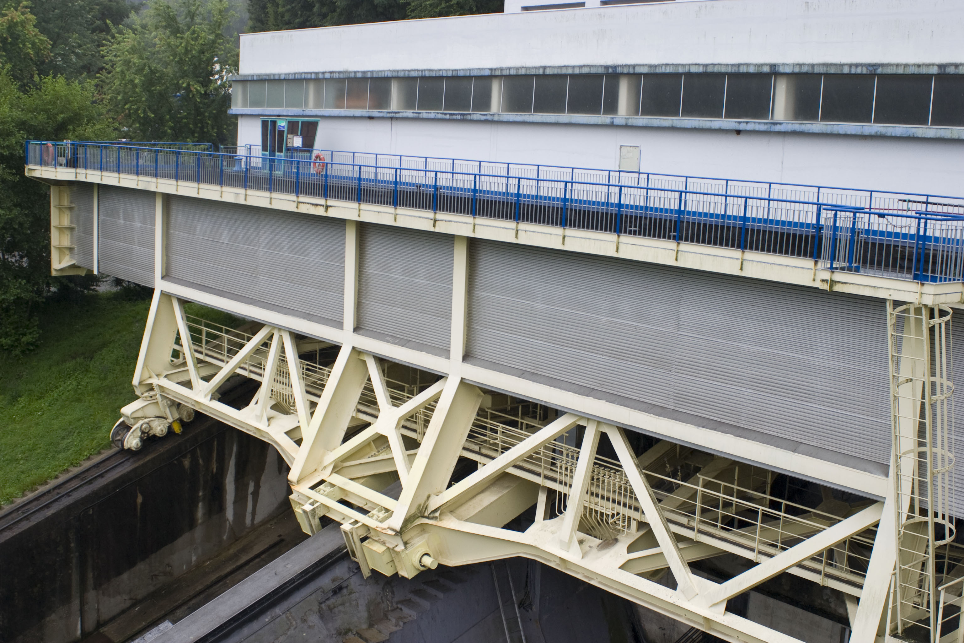 caisson du plan incliné d'Arzviller